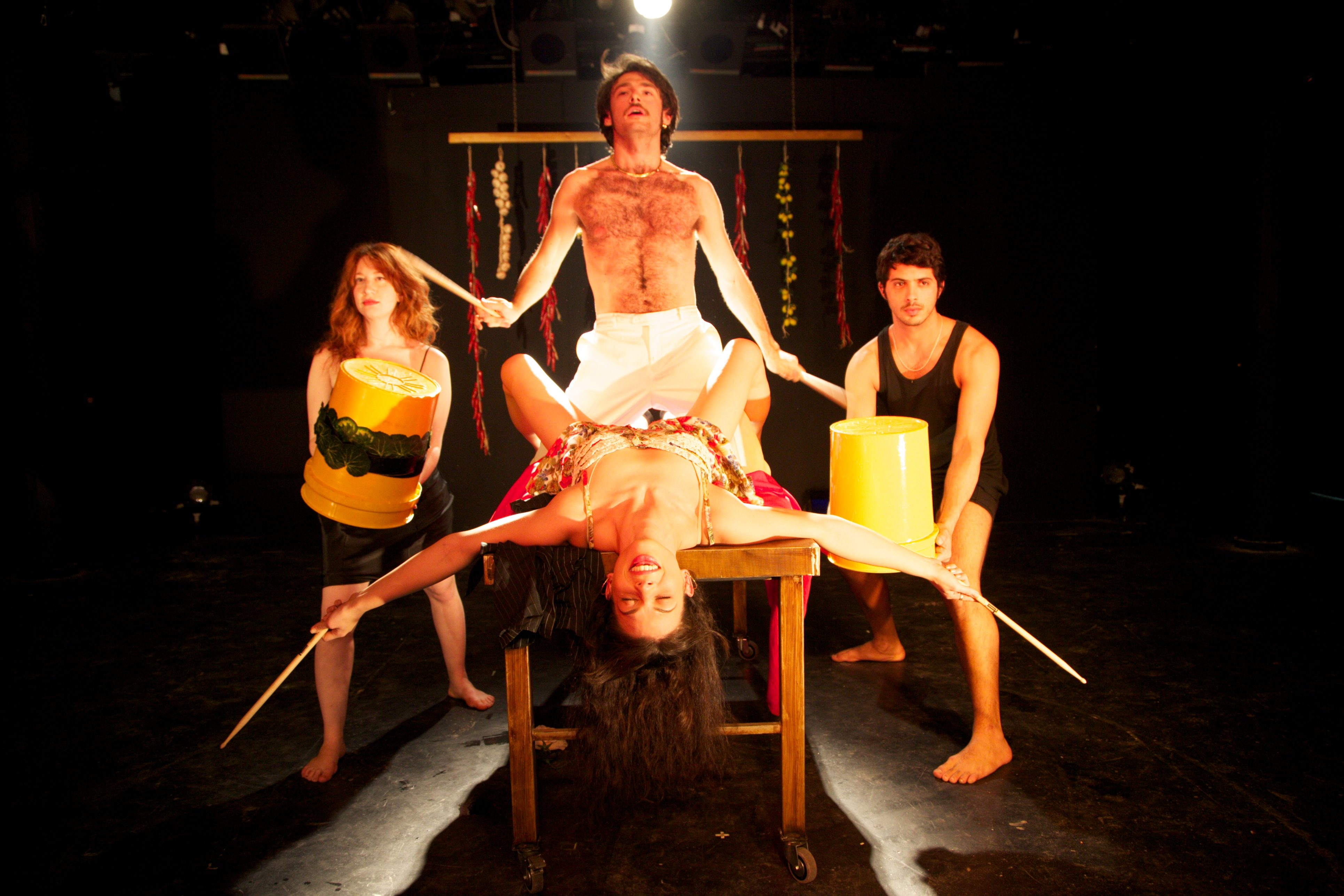 ההצגה דונה פלור נשואה לשניים בבימויו של עירד רובינשטיין בסל"ה - הסטודיו לאמנויות התיאטרון מיסודו של יורם לוינשטיין, 2012